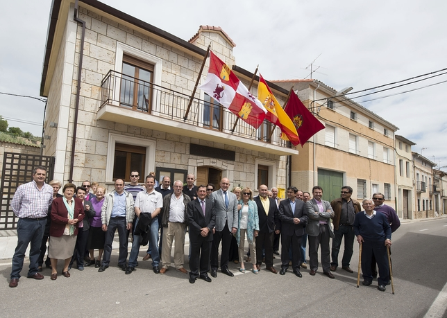 Inauguración nuevo Ayuntamiento de Bocod